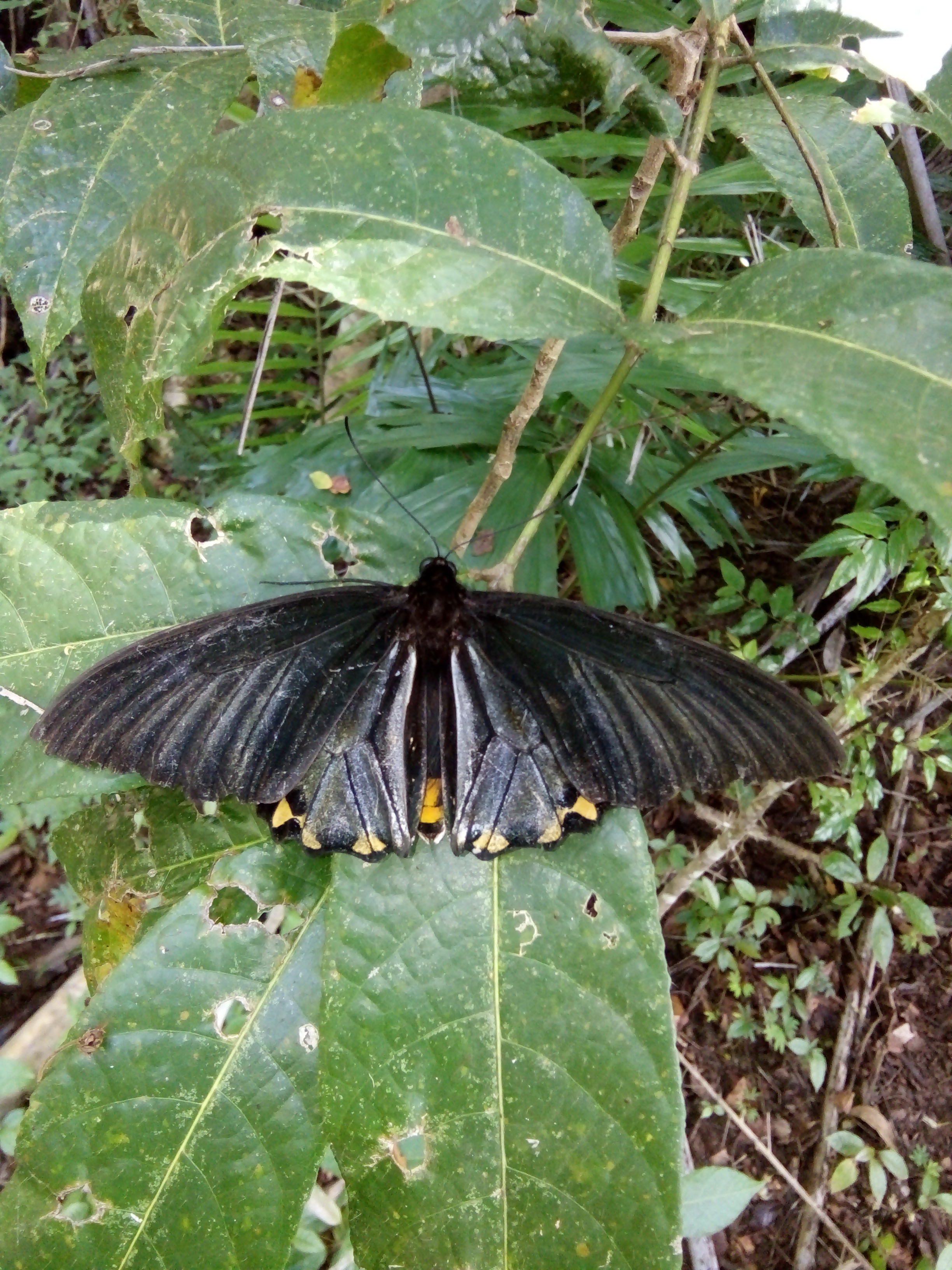 Gorontalo